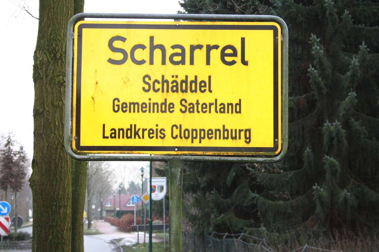 Zweisprachiges Ortsschild im Ort Scharrel (Saterfriesisch: Schäddel) in der Gemeinde Saterland, Landkreis Cloppenburg, Niedersachsen, Deutschland.